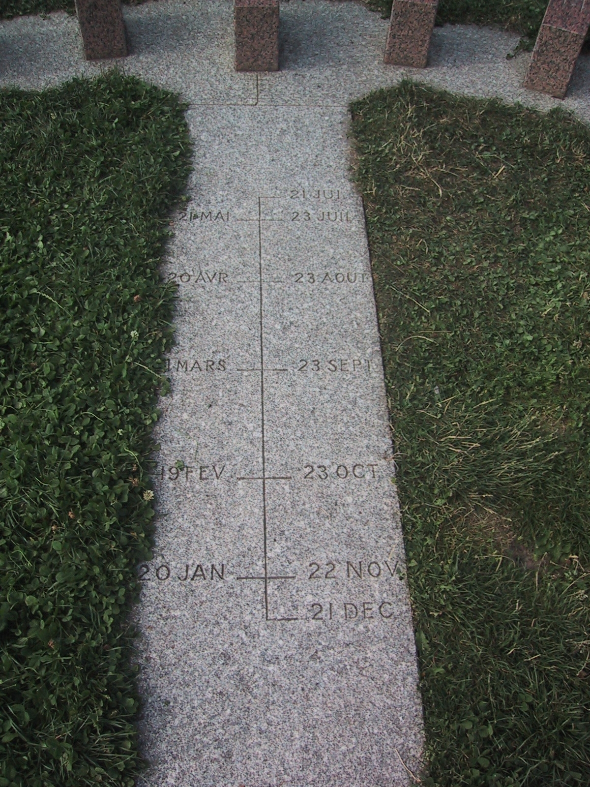 photo de la ligne méridienne avec les dates